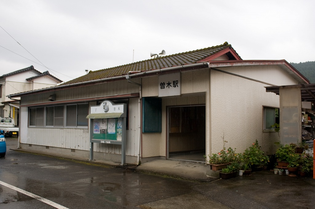 高千穂鉄道曽木駅